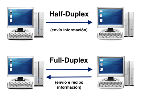 Esta imaxe representa a diferencia entre unha comunicación half-duplex e full-duplex